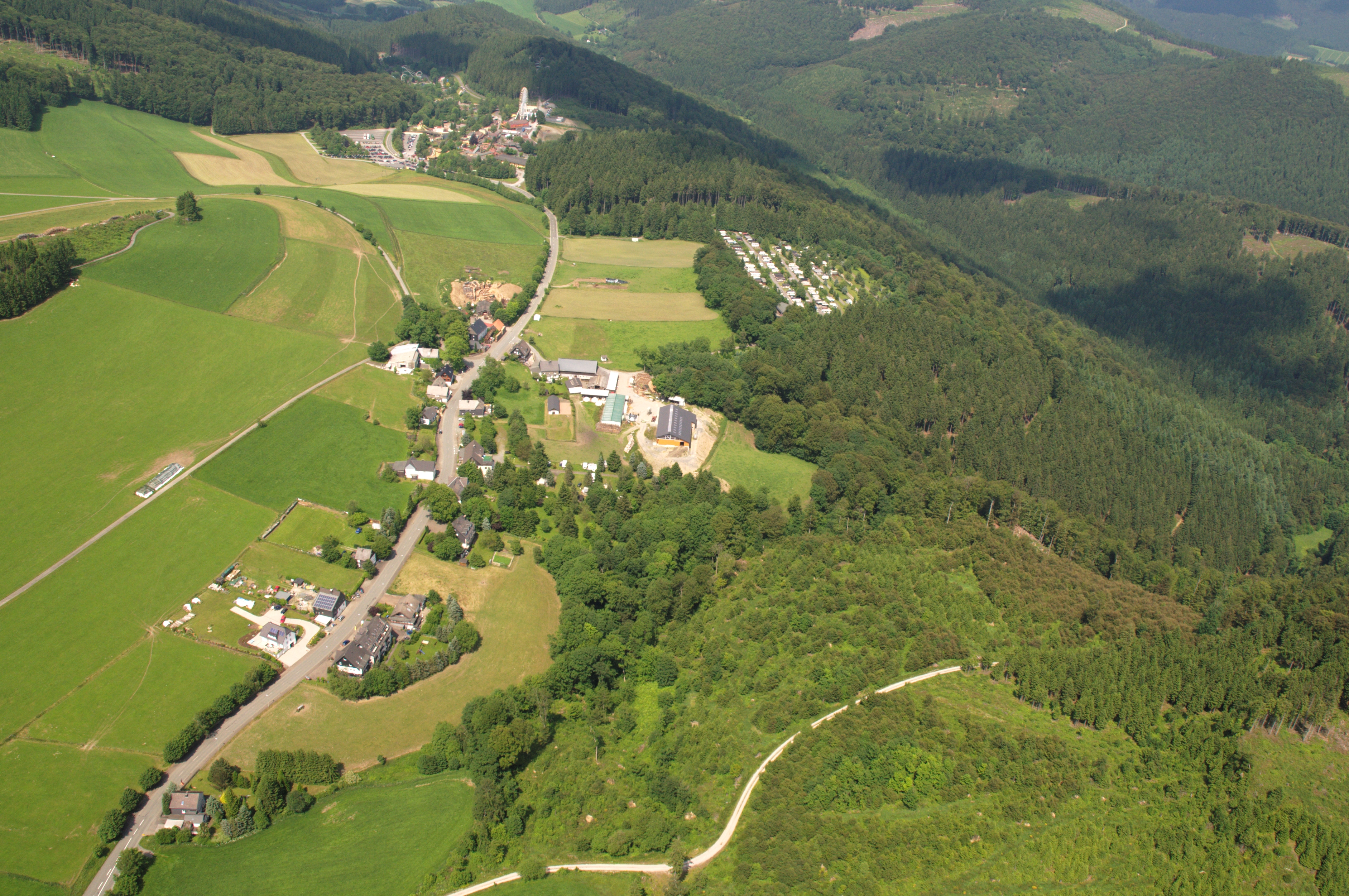 Fotoflug Sauerland-Ost: Bestwig-Wasserfall; Naturschutzgebiet Plästerlegge - auf’m Kipp (HSK-452, Bestwig); Naturschutzgebiet Plästerlegge - auf’m Kipp (HSK-260, Olsberg) rechts das Elpetal; oben Fort Fun.